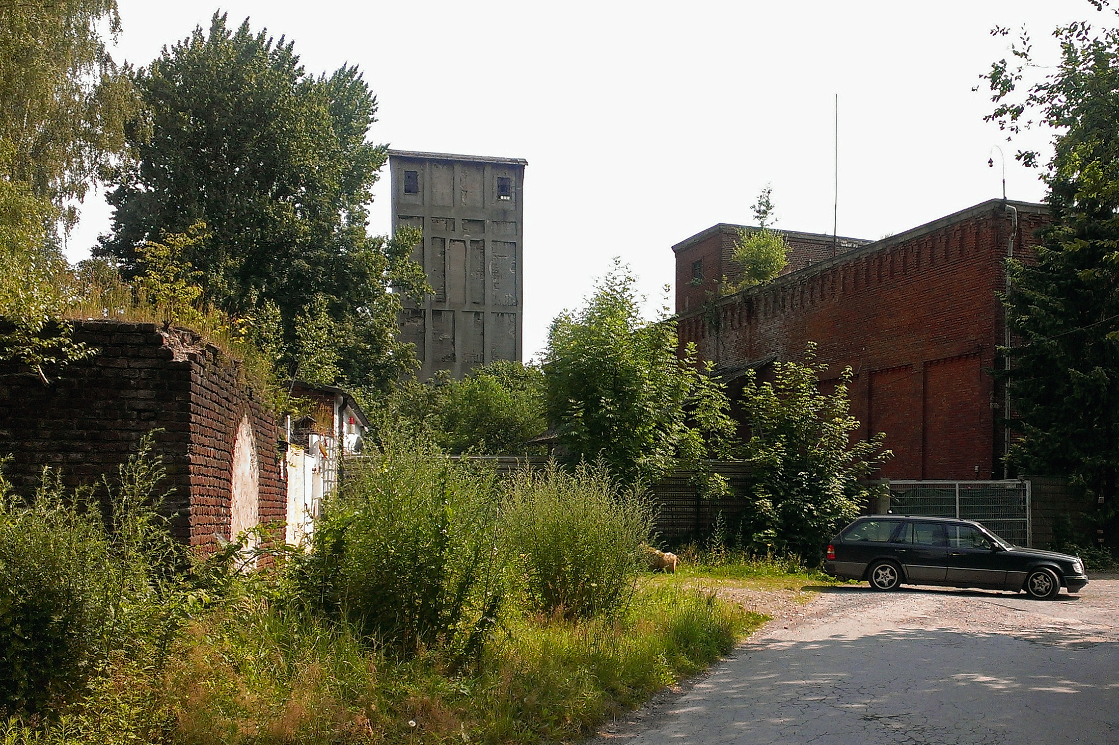 Zeche Eintracht Tiefbau, Restgebäude am Schacht Heintzmann in der Alleestraße in Essen-Freisenbruch